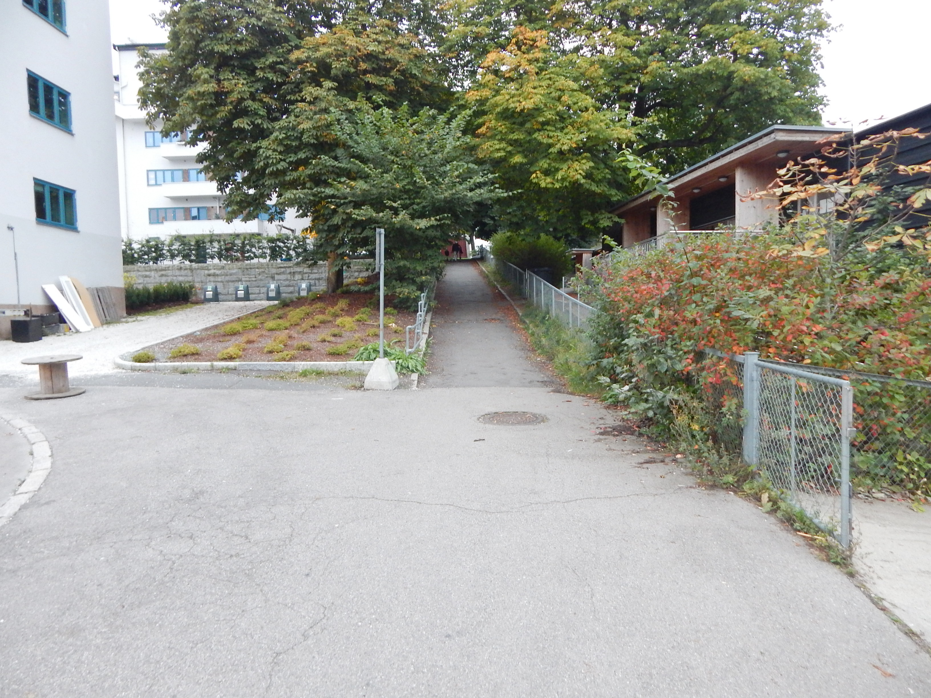 Gangvei langs den tidligere traseen til Holtermann Knudsens gate på Sandaker